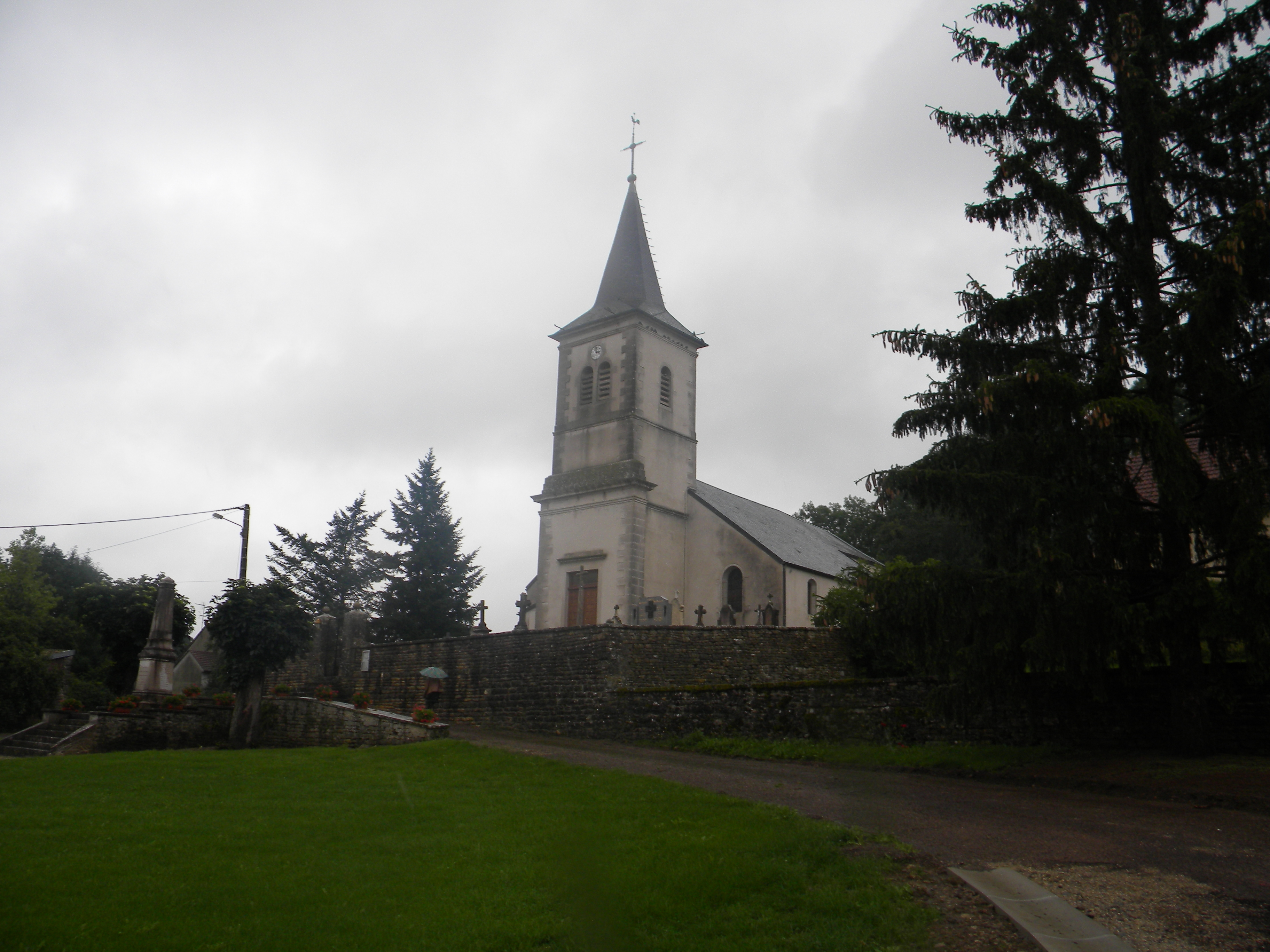 Preĝejo Saint Martin en Painblanc